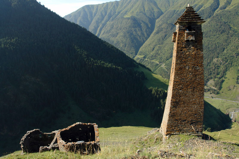 kvavlo Tusheti